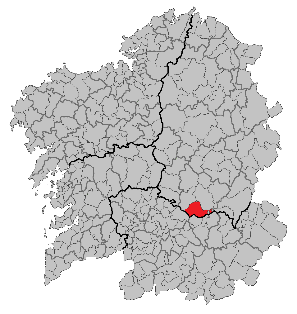 Mapa coa localización do concello de Sober.